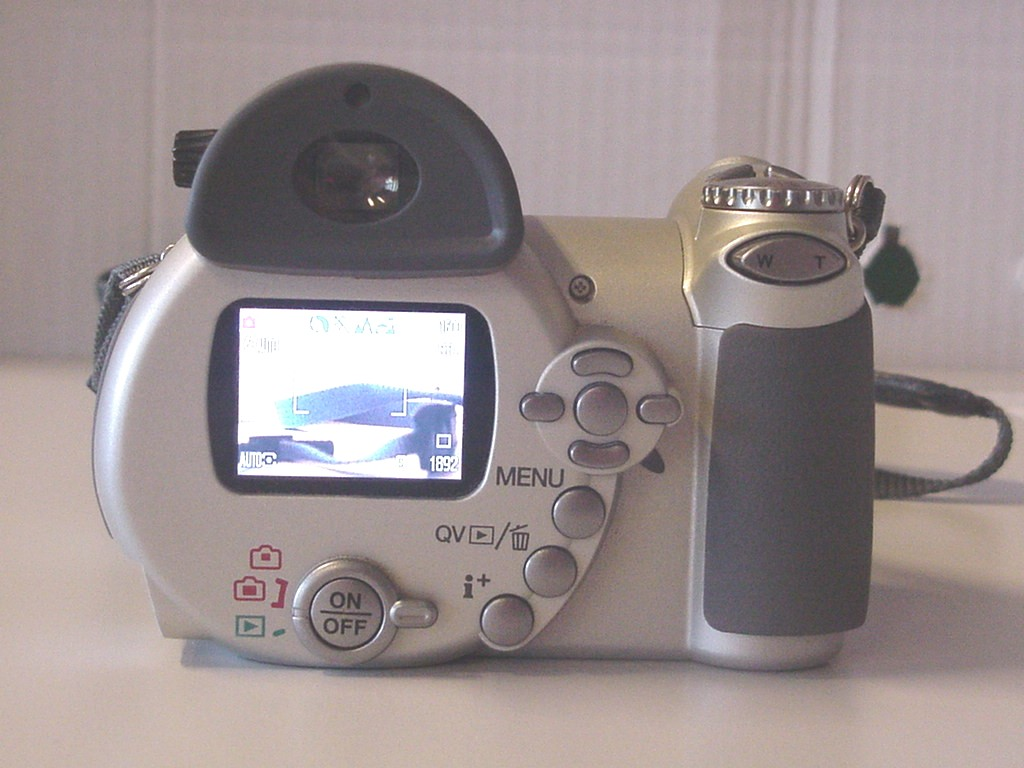 Appareil photographique numérique Minolta Dimage Z20 - Vue arrière